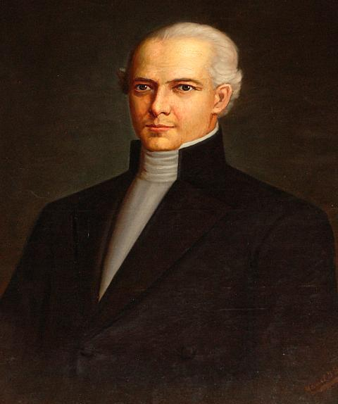 Antonio Ante, prócer de la Independencia ecuatoriana. Óleo sobre lienzo del pintor quiteño Manuel Salas Alzamora. La obra se encuentra en el Salón de los Próceres del Palacio de Najas.